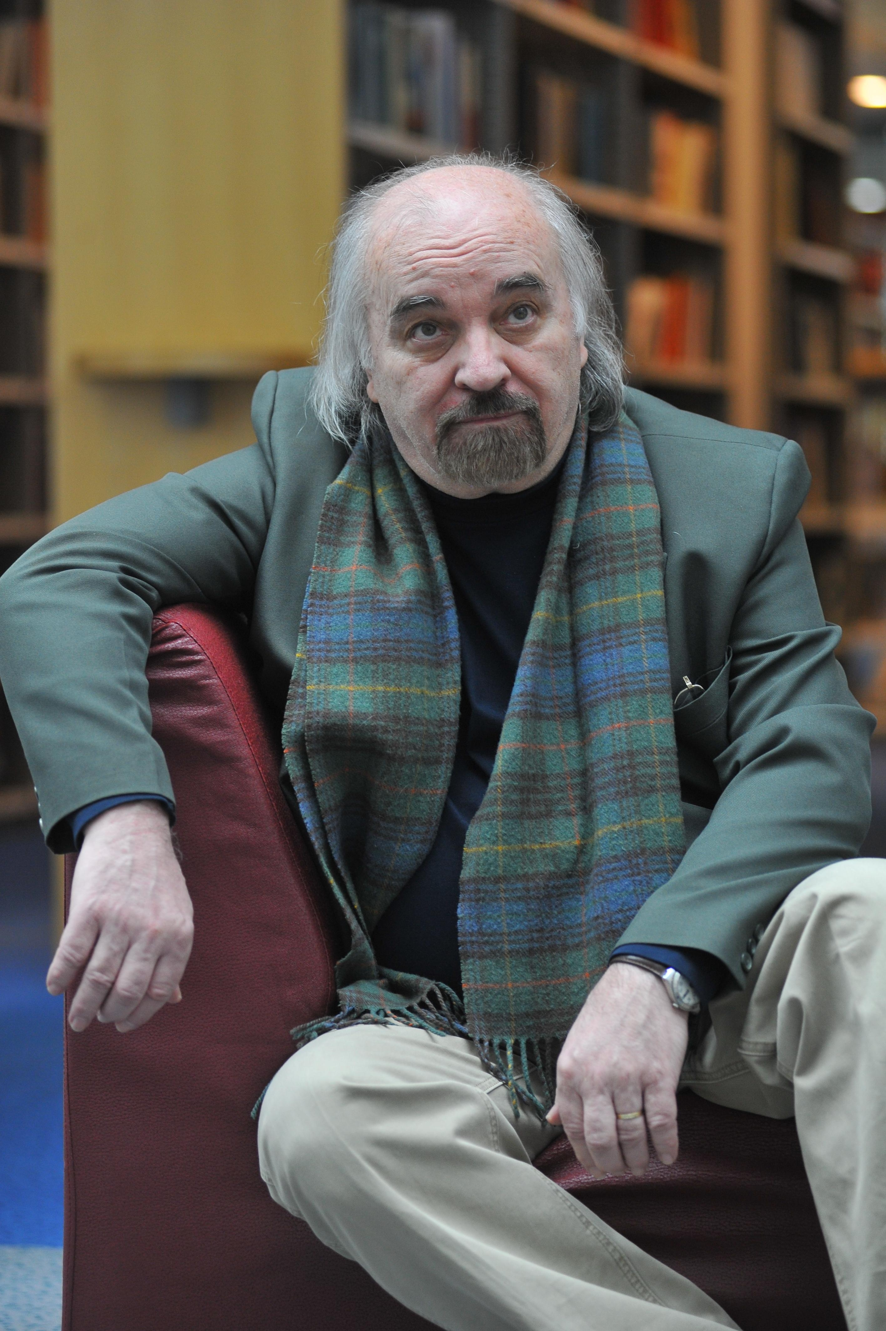 Slovenski pisatelj